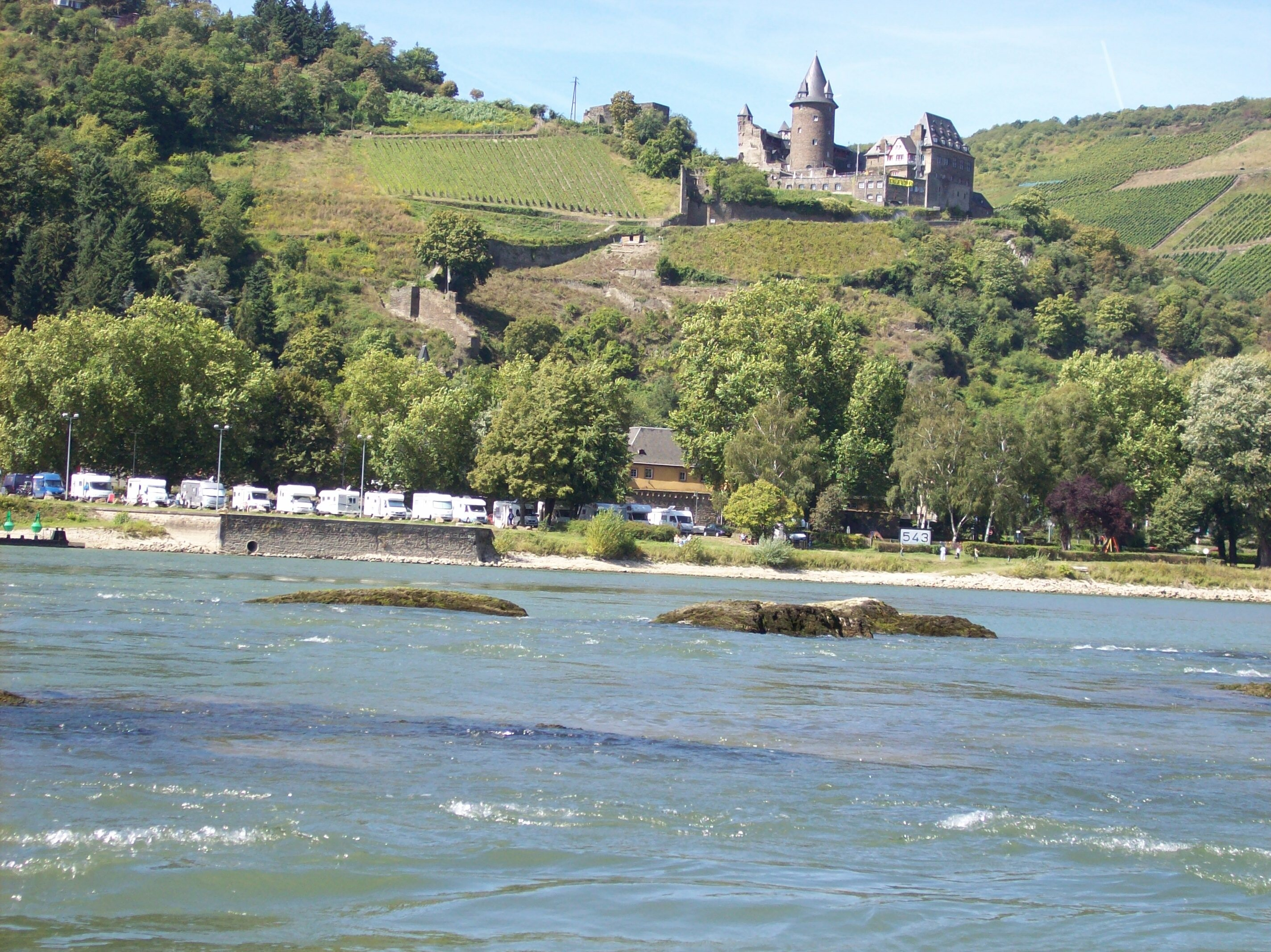 Klosterleyen. Untiefe des Rheins bei Bacharach. Stromkilometer 443. Pegel bei Kaub: 135 cm